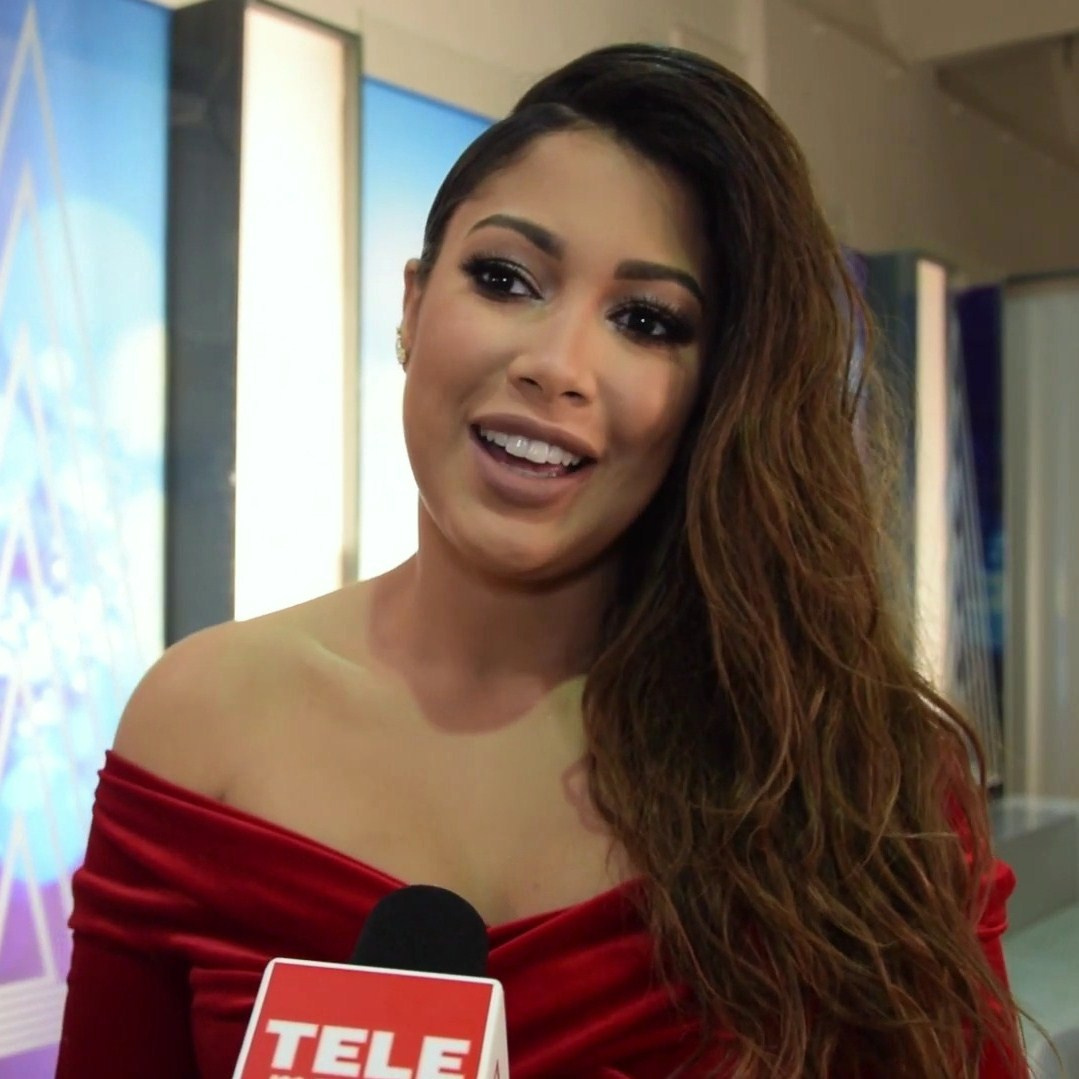 Patricia Kazadi, wokalistka i aktorka.